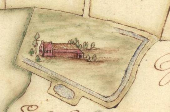 Tekening van boerderij Kokshuis. Fragment van 'Kaarte van twee stads plaatsen gelegen onder Stitswert' uit Groot Caarteboek 34 van Folckers uit 1724.